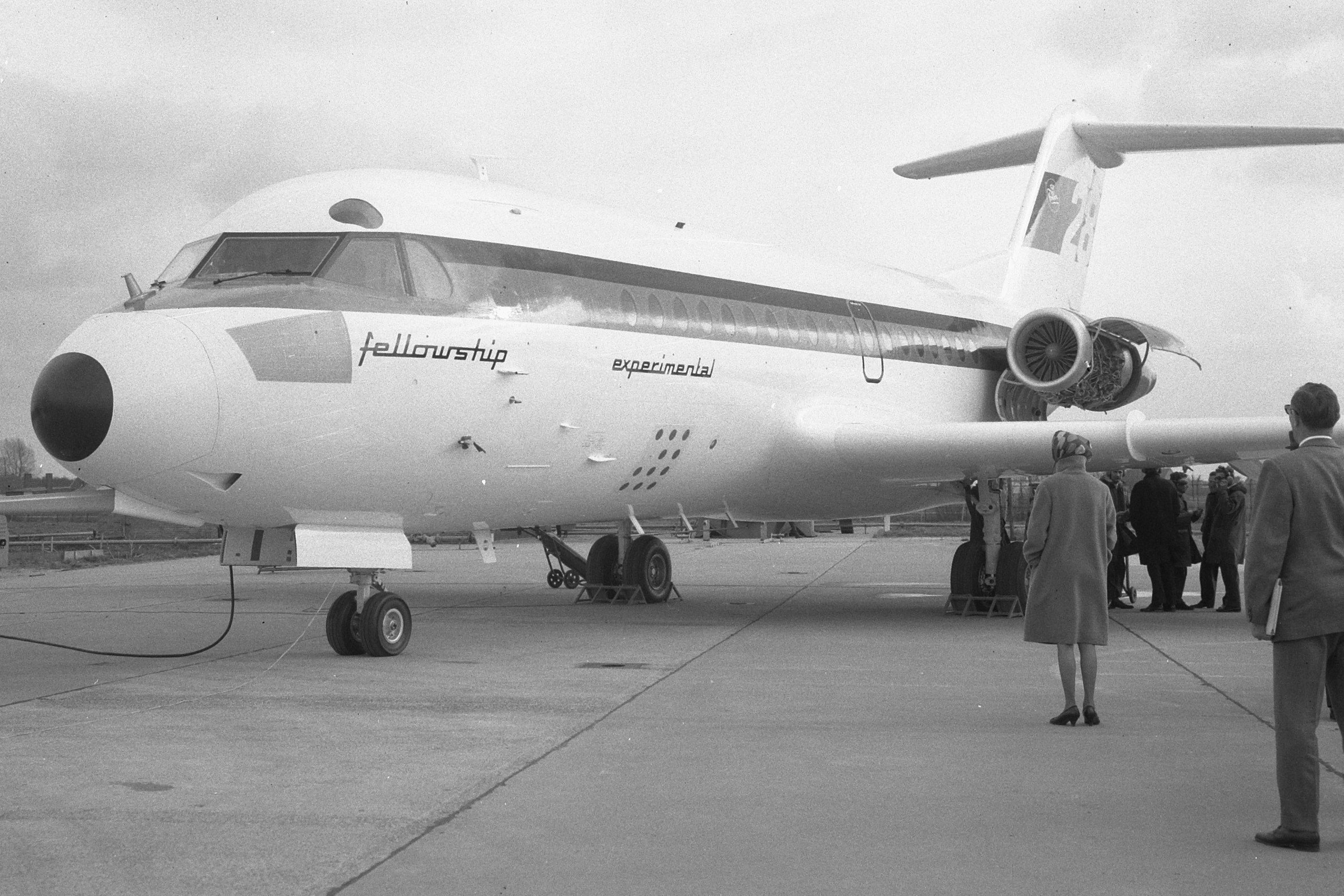 Collectie / Archief : Fotocollectie Anefo Reportage / Serie : [ onbekend ] Beschrijving : Nieuw vliegtuig van Fokker, de Fellowship F28 Datum : 7 april 1967 Trefwoorden : vliegtuigen Persoonsnaam : FOKKER Fotograaf : Evers, Joost / Anefo Auteursrechthebbende : Nationaal Archief Materiaalsoort : Negatief (zwart/wit) Nummer archiefinventaris : bekijk toegang 2.24.01.03 Bestanddeelnummer : 920-2145